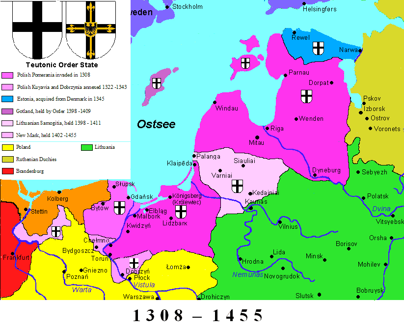 history map of Ordensstaat, 1455